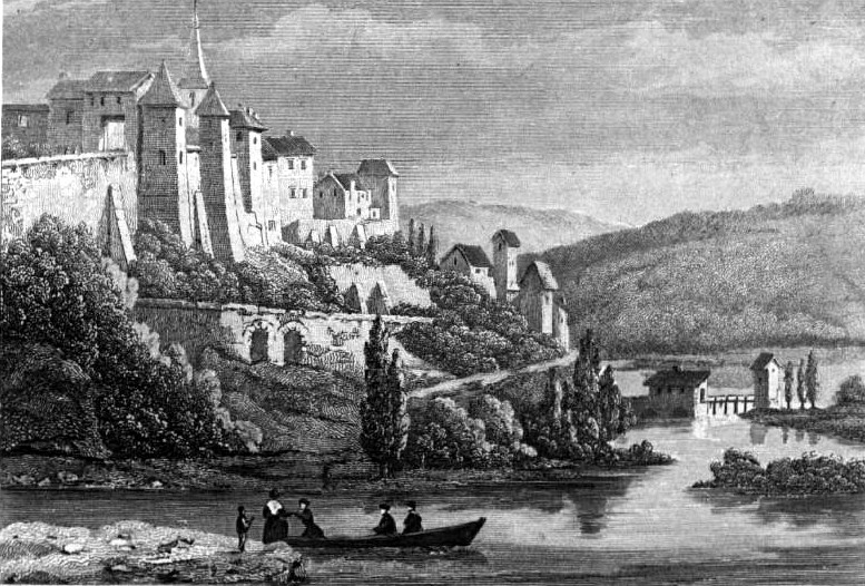 Image en provenance du livre : Eusèbe Girault de Saint-Fargeau, Guide pittoresque du voyageur en France, contenant la statistique et la description complète des quatre-vingt-six départements, orné de 740 vignettes et portraits gravés sur acier, de quatre-vingt-six cartes de départements et d'une grande carte routière de la France, par une Société de gens de lettres, de géographes et d'artistes, Paris, F. Didot frères, 1838, 6 volumes in-8° (BNF : 8-L25- 46). Volume III Didot frères, 1838. Route de Paris à Nice traversant les départements de l'Isère, des Hautes-Alpes, des Basses-Alpes et du Var. auteurs dessins : Rauch (ou autre) auteurs gravures : Skelton fils, Schroeder, Bishop (ou autre)